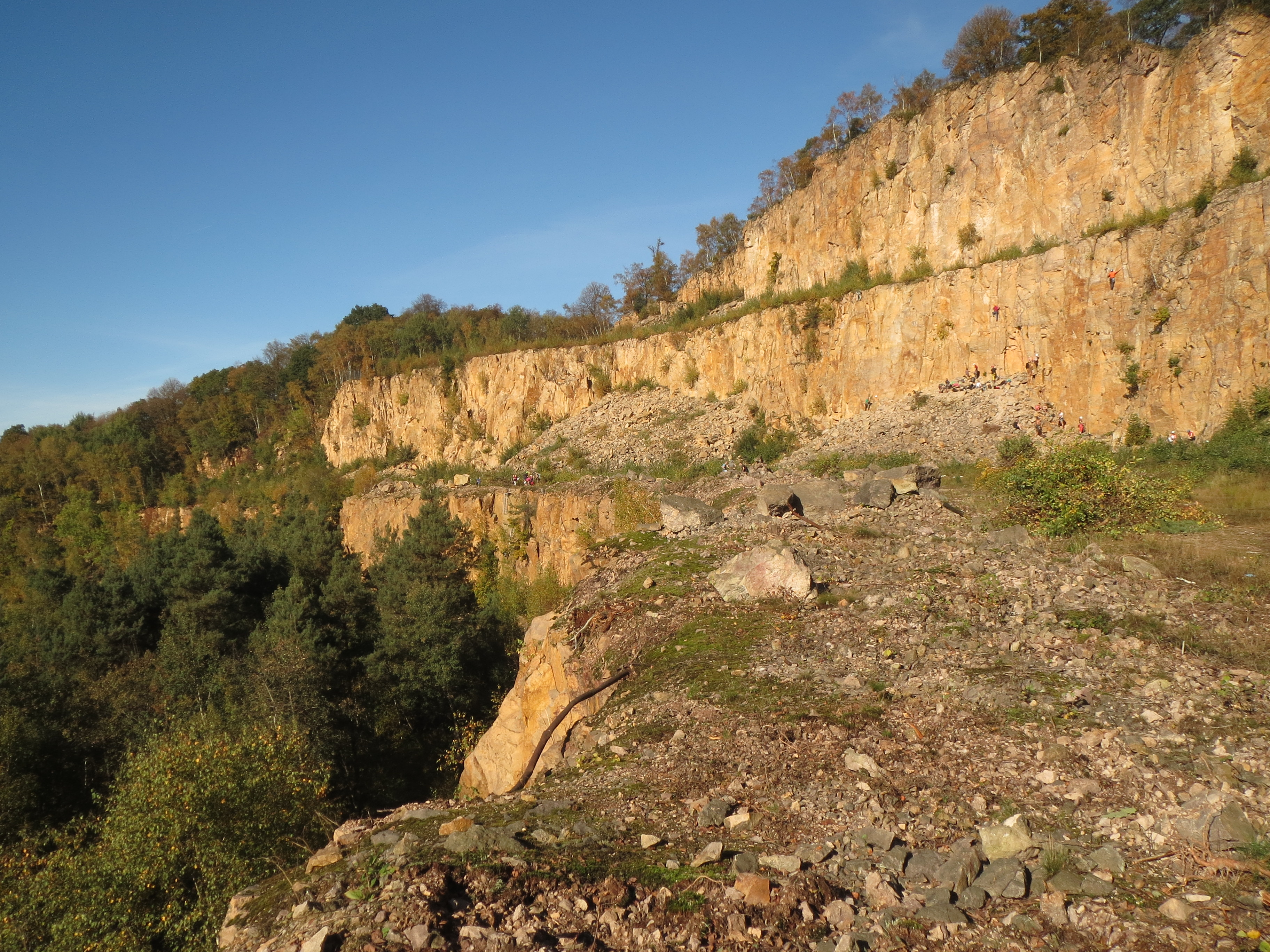 Blick über den Steinbruch Schriesheim (Ebene drei), nach Norden